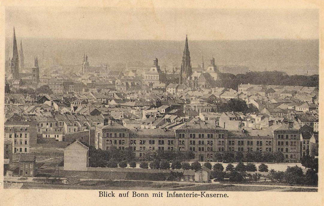 Scan historische Postkarte, Blick auf Bonn mit Infanterie-Kaserne. Ermekeilkaserne vom Venusberg aus gesehen.